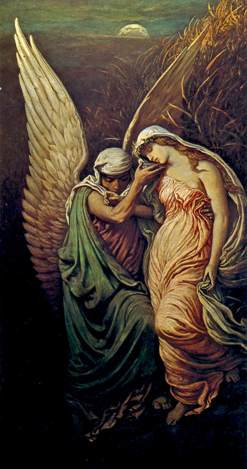 La copa de la muerte (1885), de Elihu Vedder, Virginia Museum of Fine Arts, Richmond.